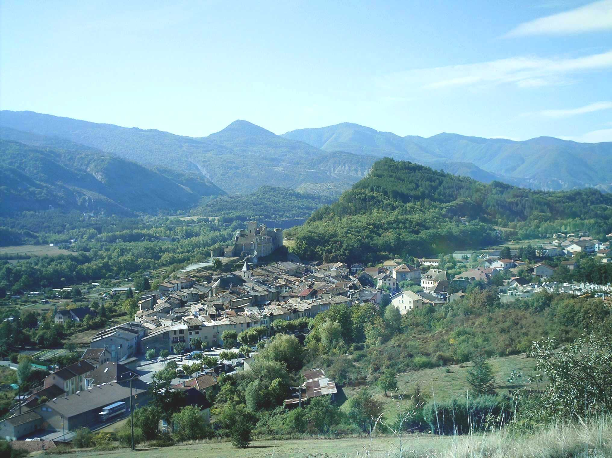 Le château de Tallard et le centre ville. A gauche, la vallée de la Durance.